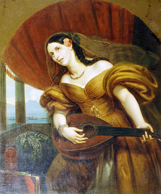 графиня Мария Александровна Потоцкая, урожд. Салтыкова-Головкина (1807–1845), жена графа Болеслава Потоцкого.